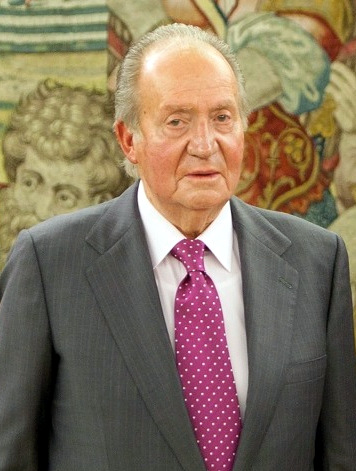 D. Borja Prado Eulate, presidente de Endesa, junto a S.A.R el rey Don Juan Carlos durante el evento de entrega de los premios Fondena 2014